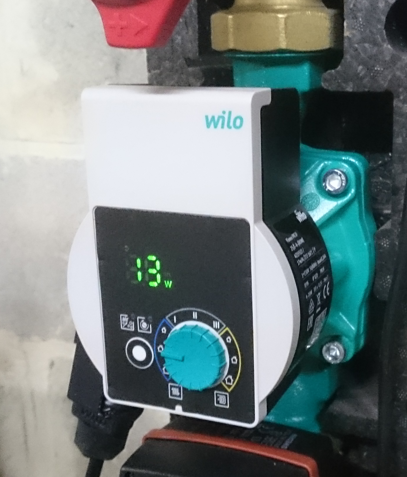 Circulateur Wilo Yonos PICO dans une installation de chauffage central. Circulateur basse consommation à aimant permanent.